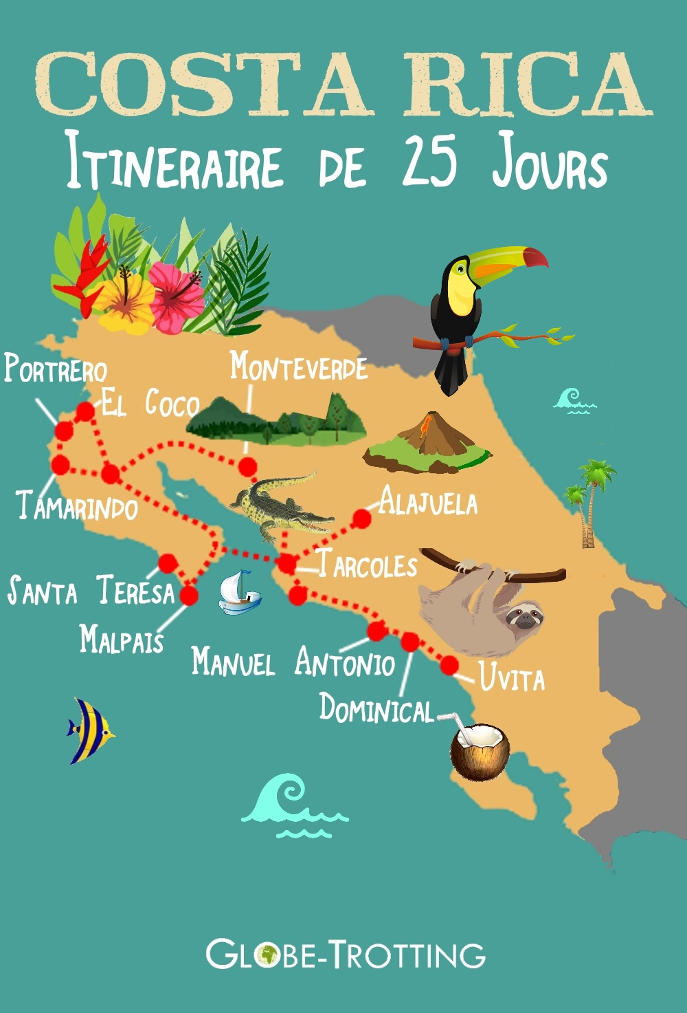 Costa Rica, Carte touristique et itinéraire de voyage Tout le détail du voyage sur